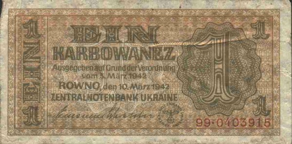 1 karbovanets